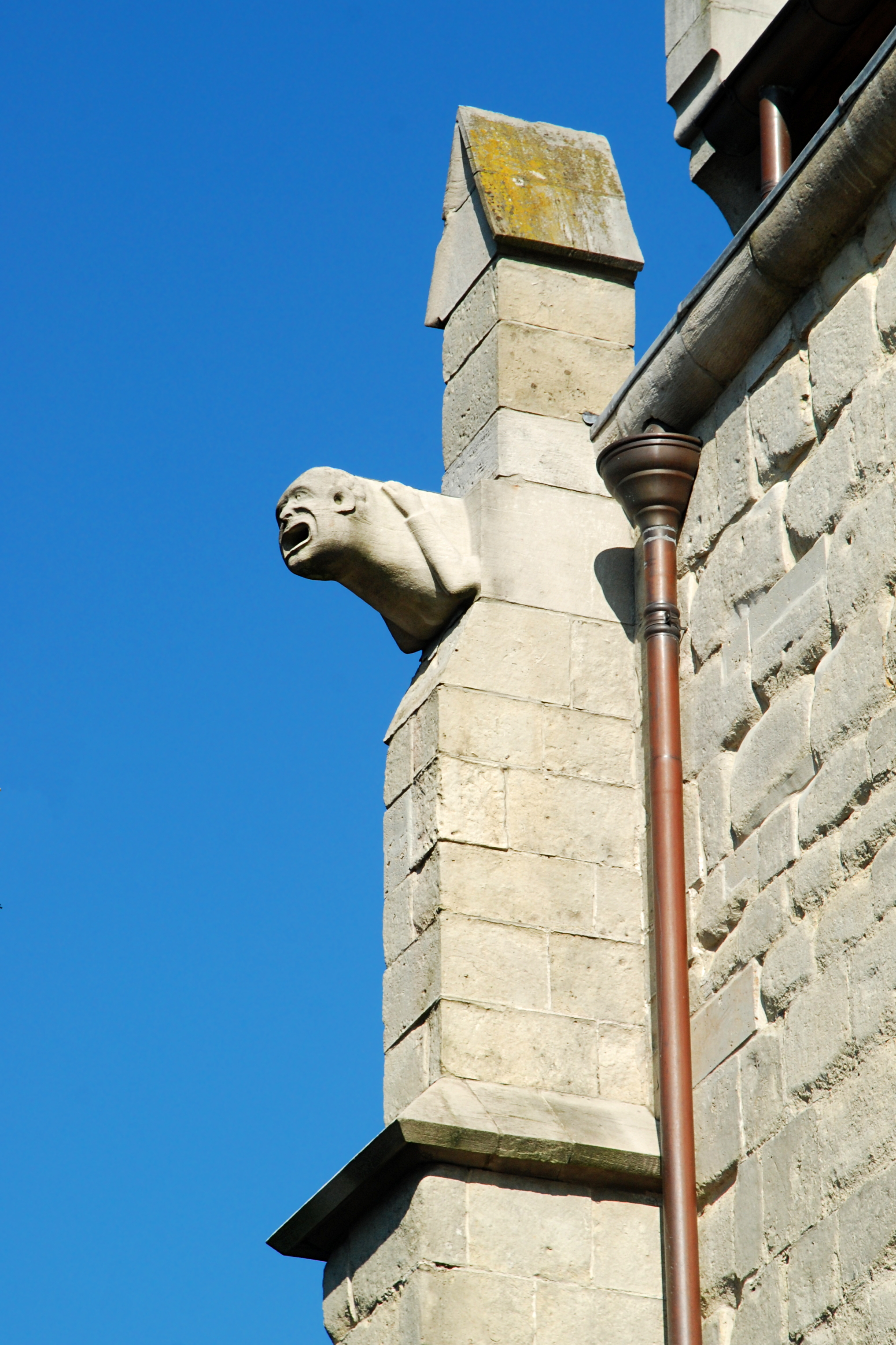 Belgique - Bruxelles - Ancienne église Notre-Dame de Laeken (gothique 13e siècle)